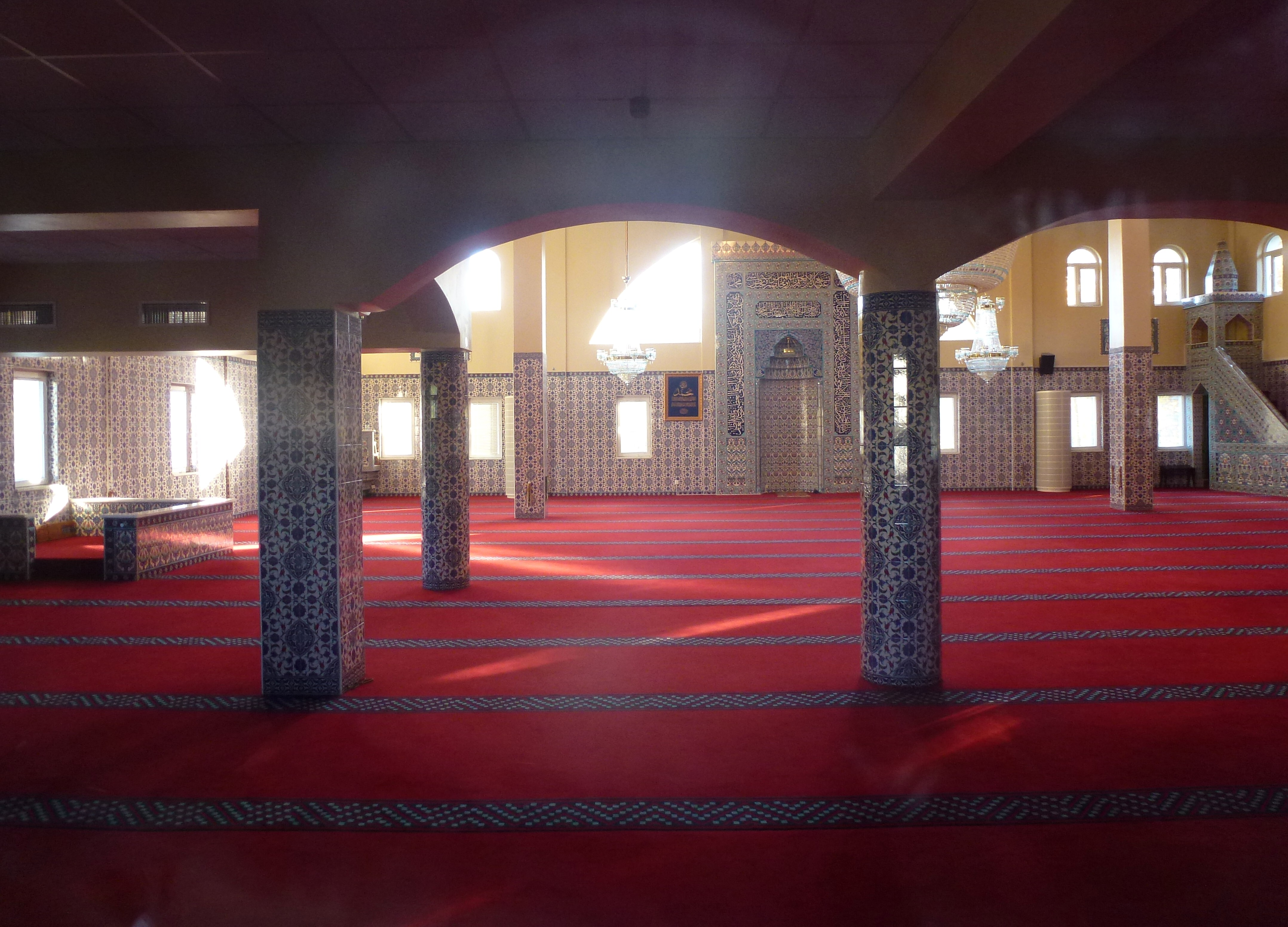 Fittja moske, interiör